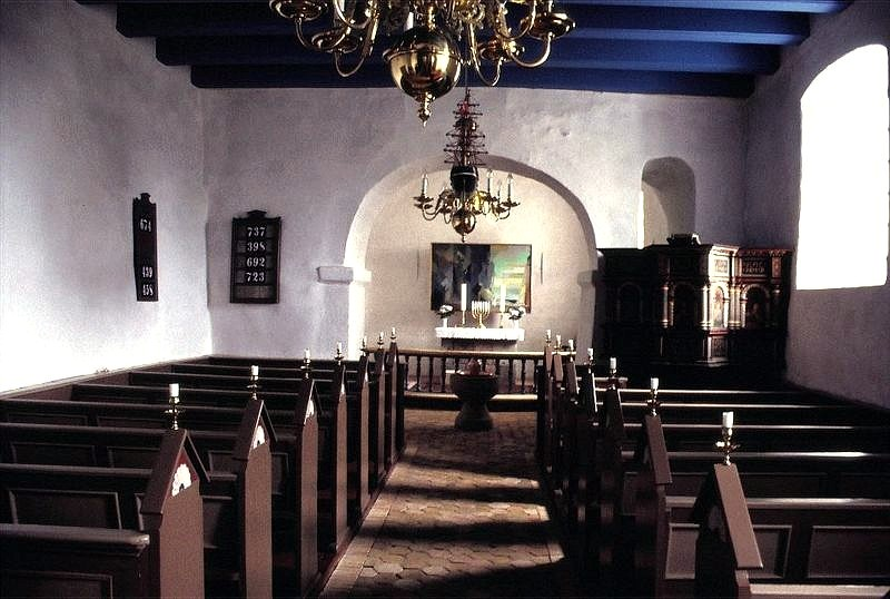 Stenum Kirke i Danmark. Skibet set mod øst